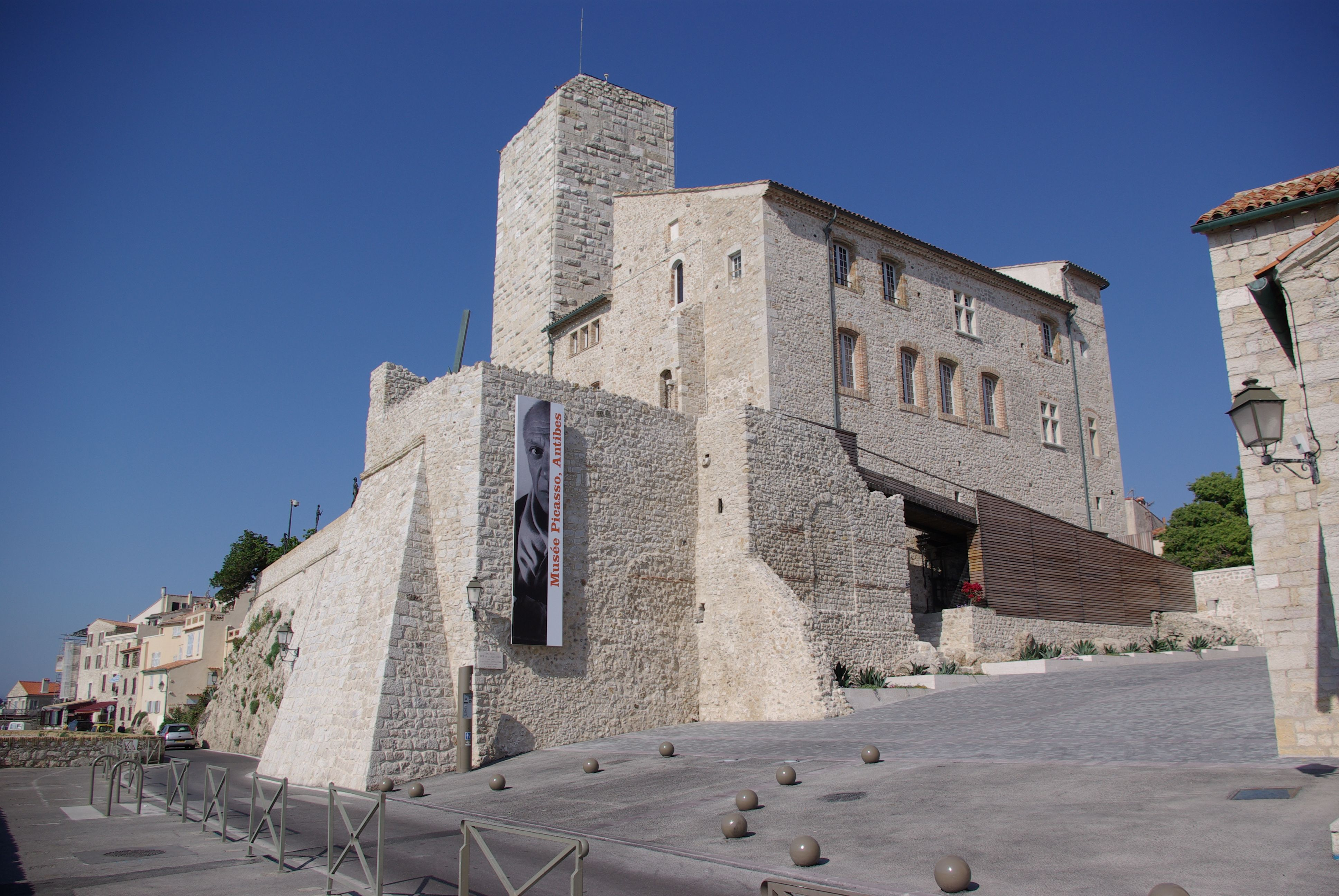 Antibes in Frankreich. Das Museum Picasso befindet sich in dem Schloss der Grimaldis. Das Schloß lieg direkt am Meer.